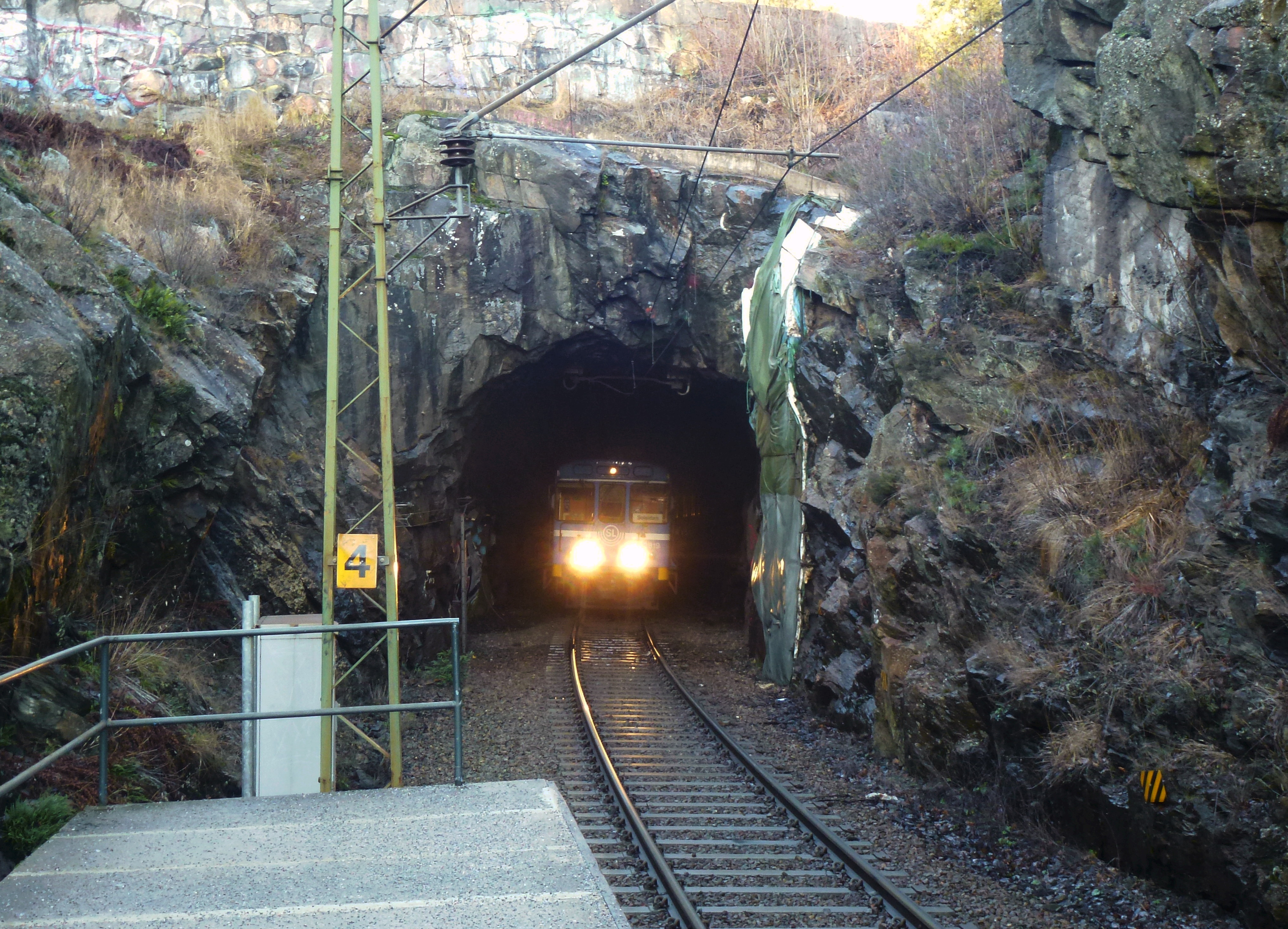 Tattbytunneln, södra tunnelöppning